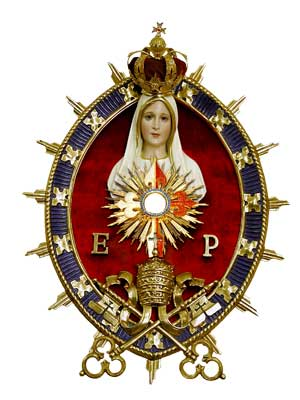 Lo Stemma dell'Associazione Intenazionale di diritto pontificio "Araldi del Vangelo"